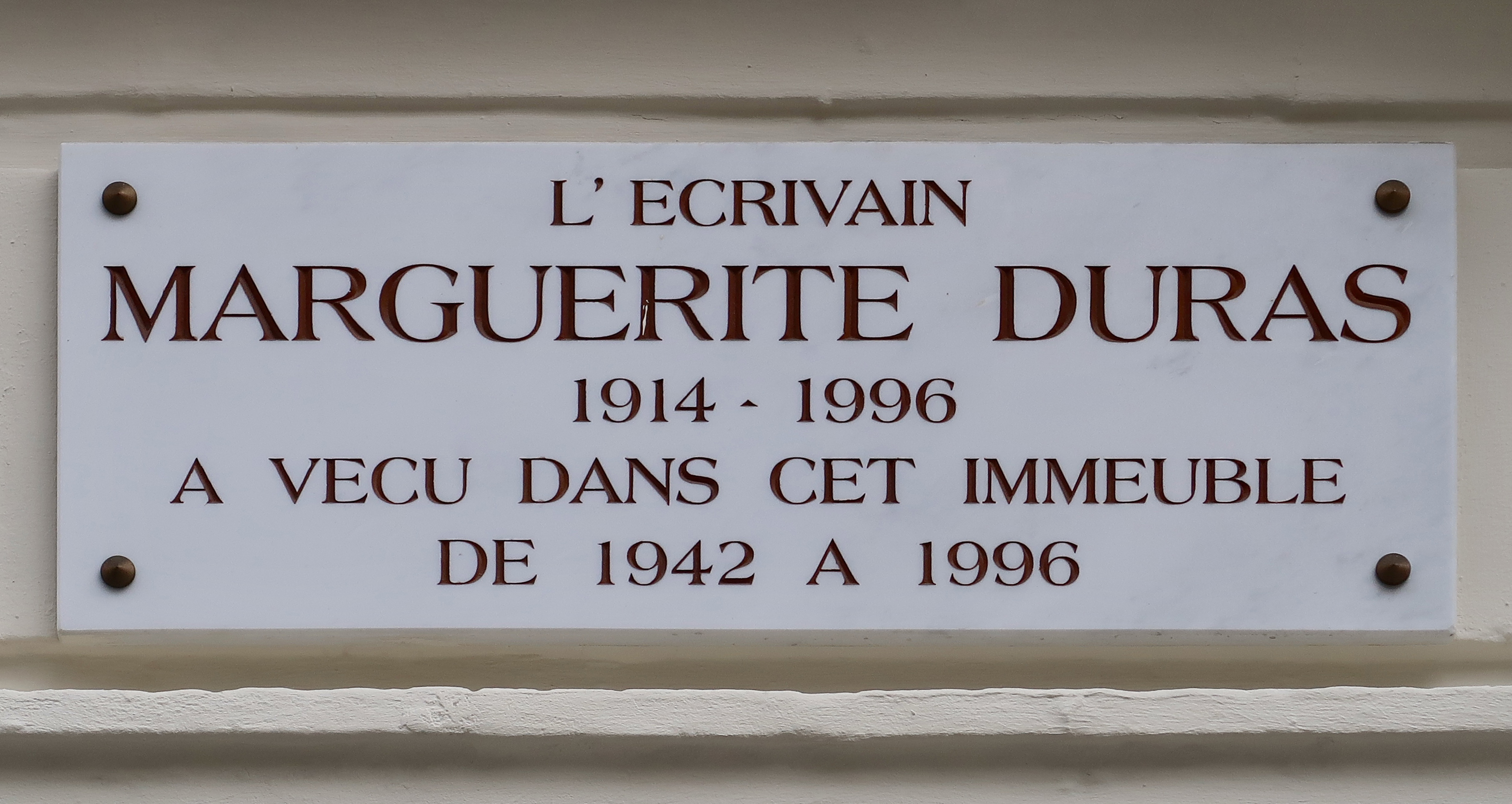 Plaque en hommage à Marguerite Duras, 5 rue Saint-Benoît (Paris, 6e).